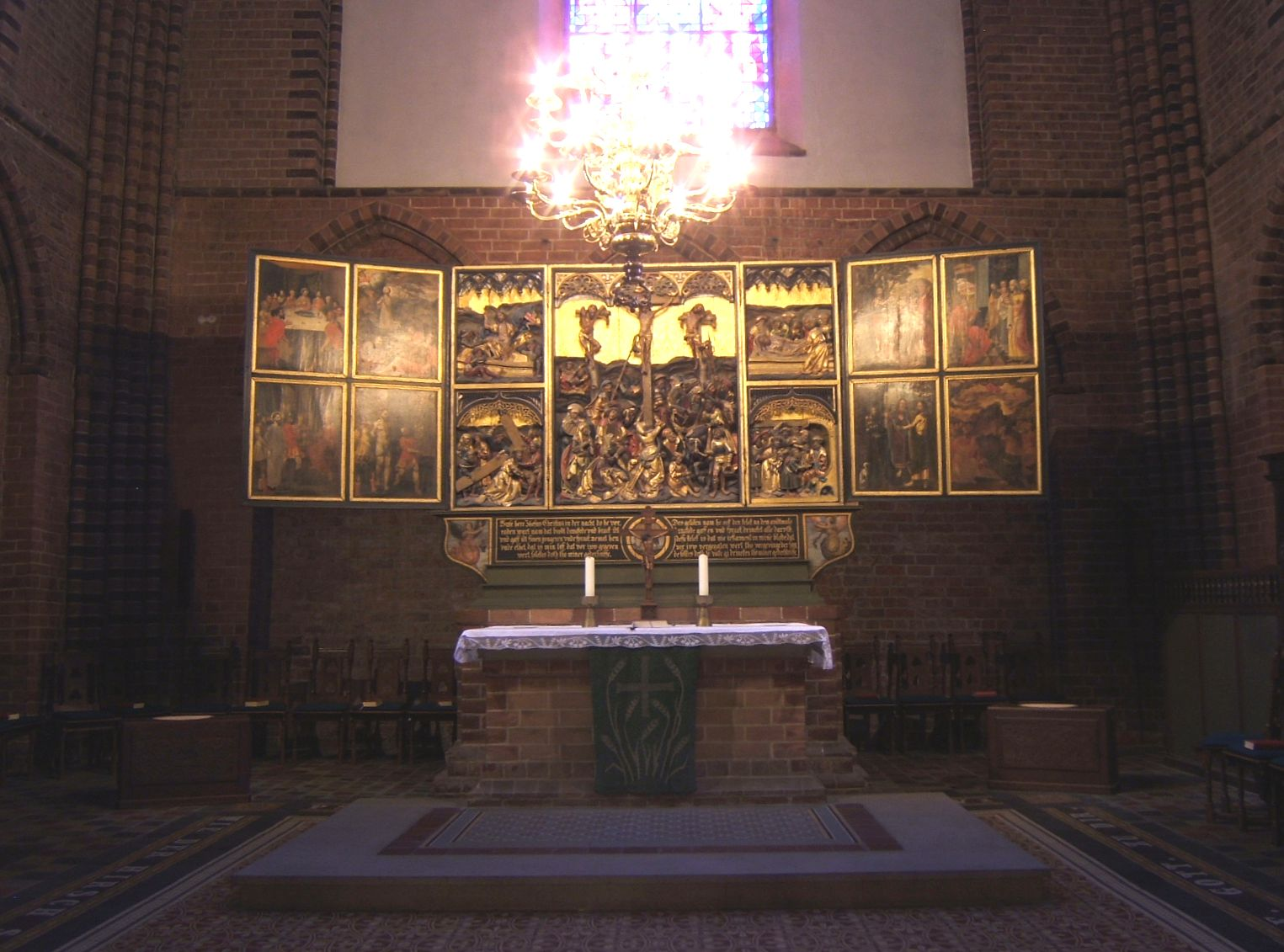 Altar der St. Johannes-Kirche in Meldorf (Meldorfer Dom genannt)